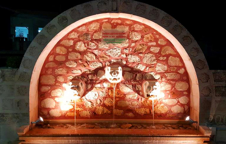 Τα λιονταράκια στην πλατεία του Σγουροκεφαλίου